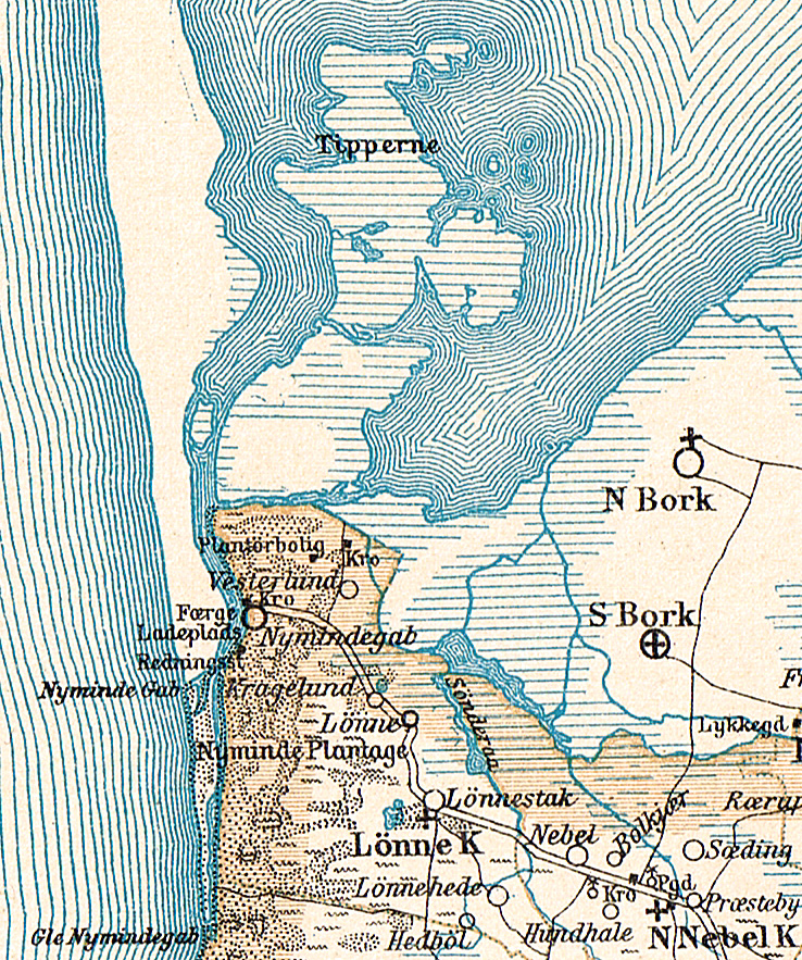 Kort over det tidligere udløb fra Ringkøbing Fjord ved Nymindegab i den nordvestlige del af Ribe Amt